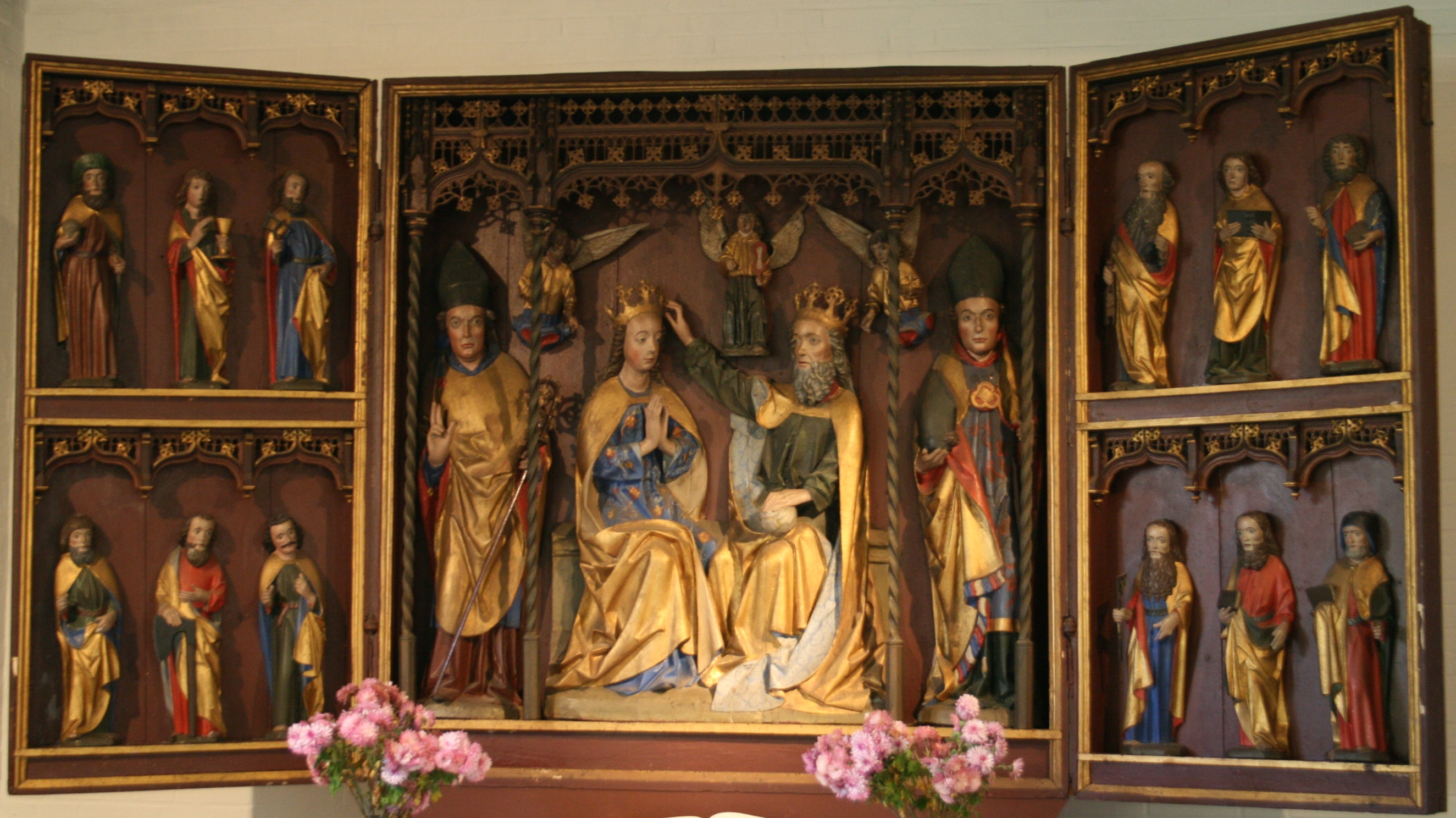 Altar in der Alten Dorfkirche St. Niels in Westerland auf Sylt